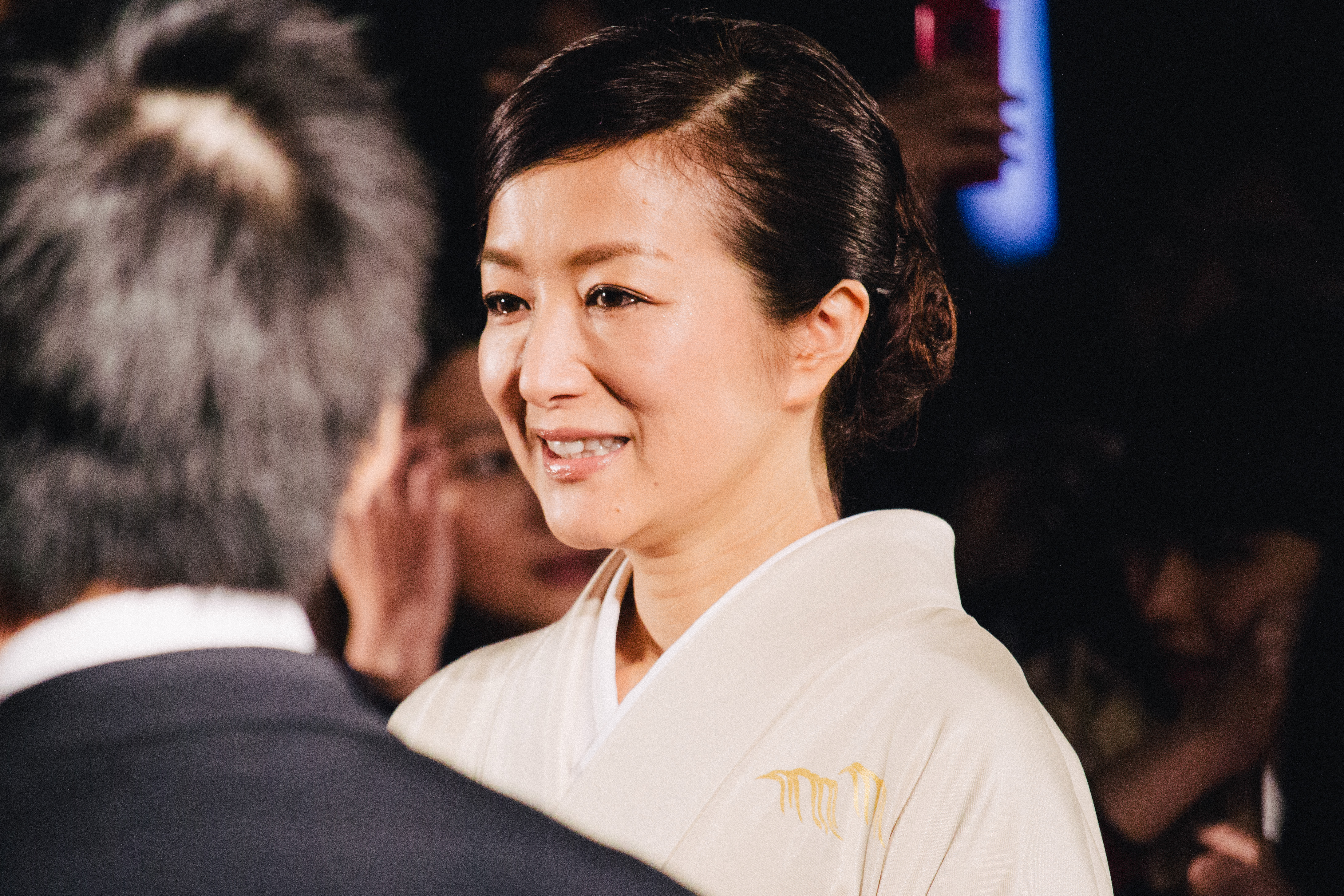 第27回 東京国際映画祭 鈴木京香 (救いたい)